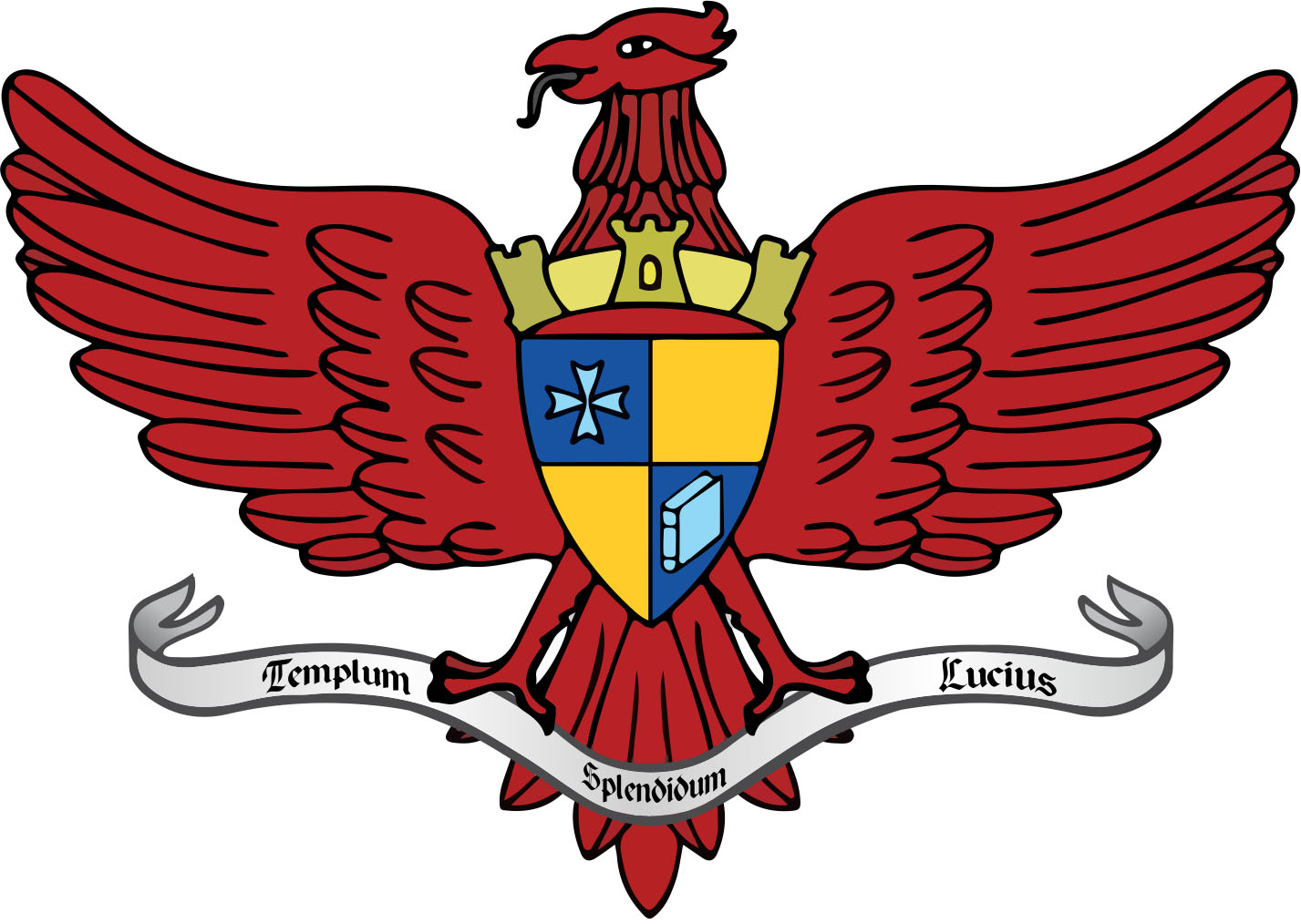 Brasão de Armas do Município de Viçosa, Estado de Minas Gerais, Brasil.